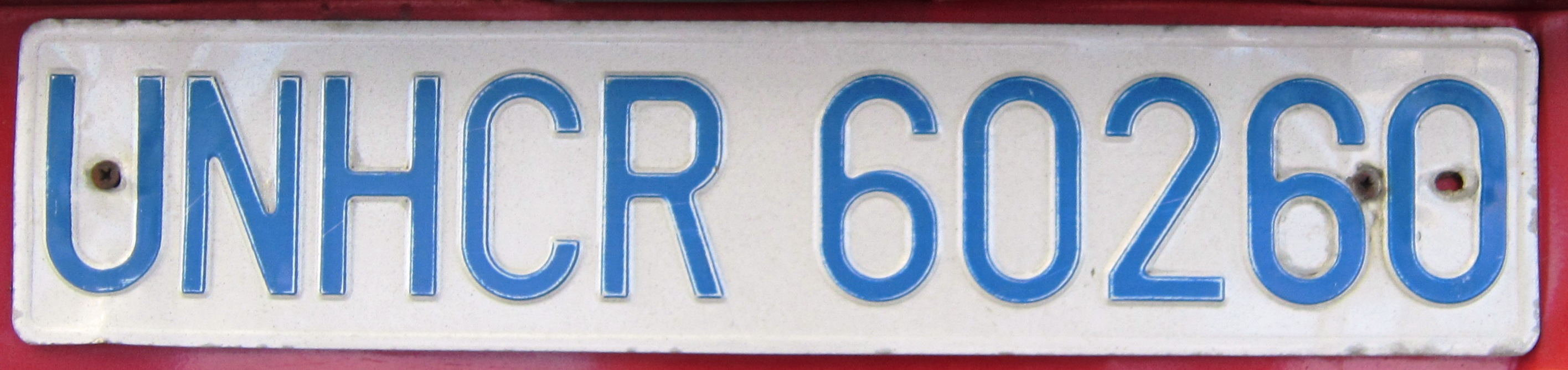 Servië UNHCR kenteken plaat